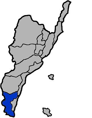 本圖係小籃子為編輯臺灣省臺東縣達仁鄉所改繪，感謝KJ提供原圖。